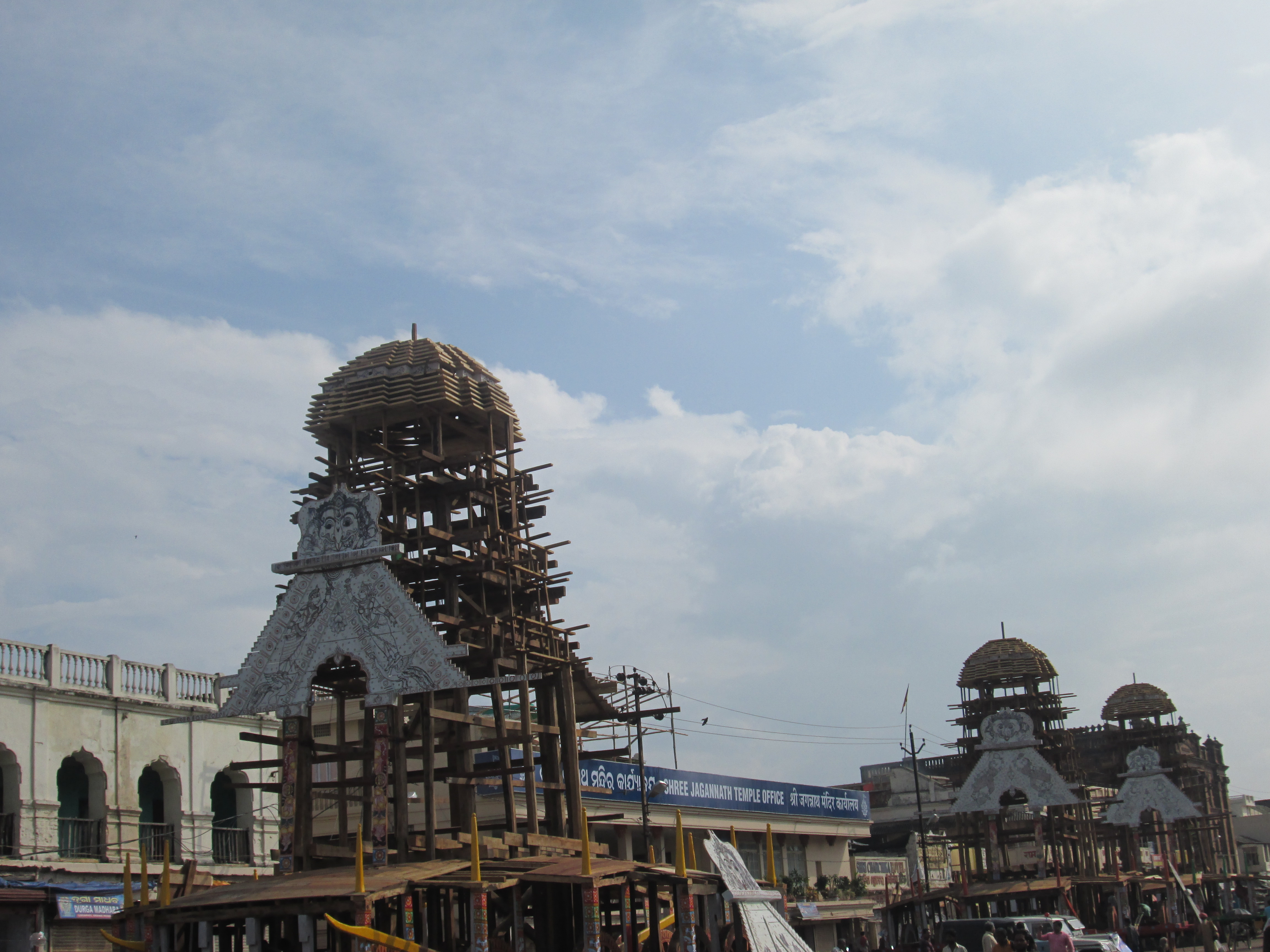 ଓଡ଼ିଆ: ରଥ ପ୍ରସ୍ତୁତି